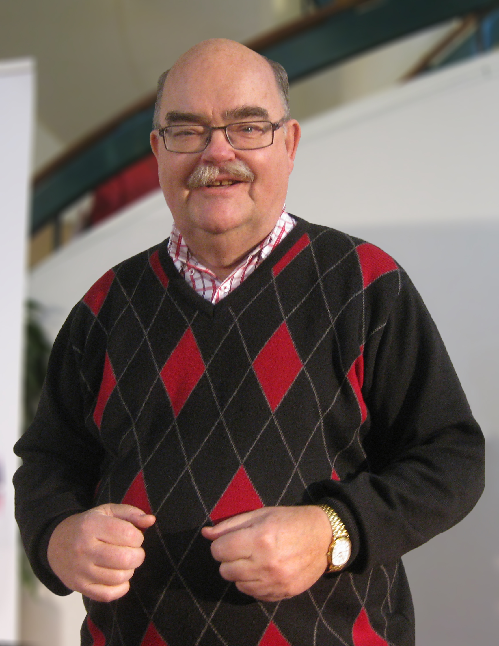 Leif "Loket" Olsson på Frölunda torg, 15 november 2010.